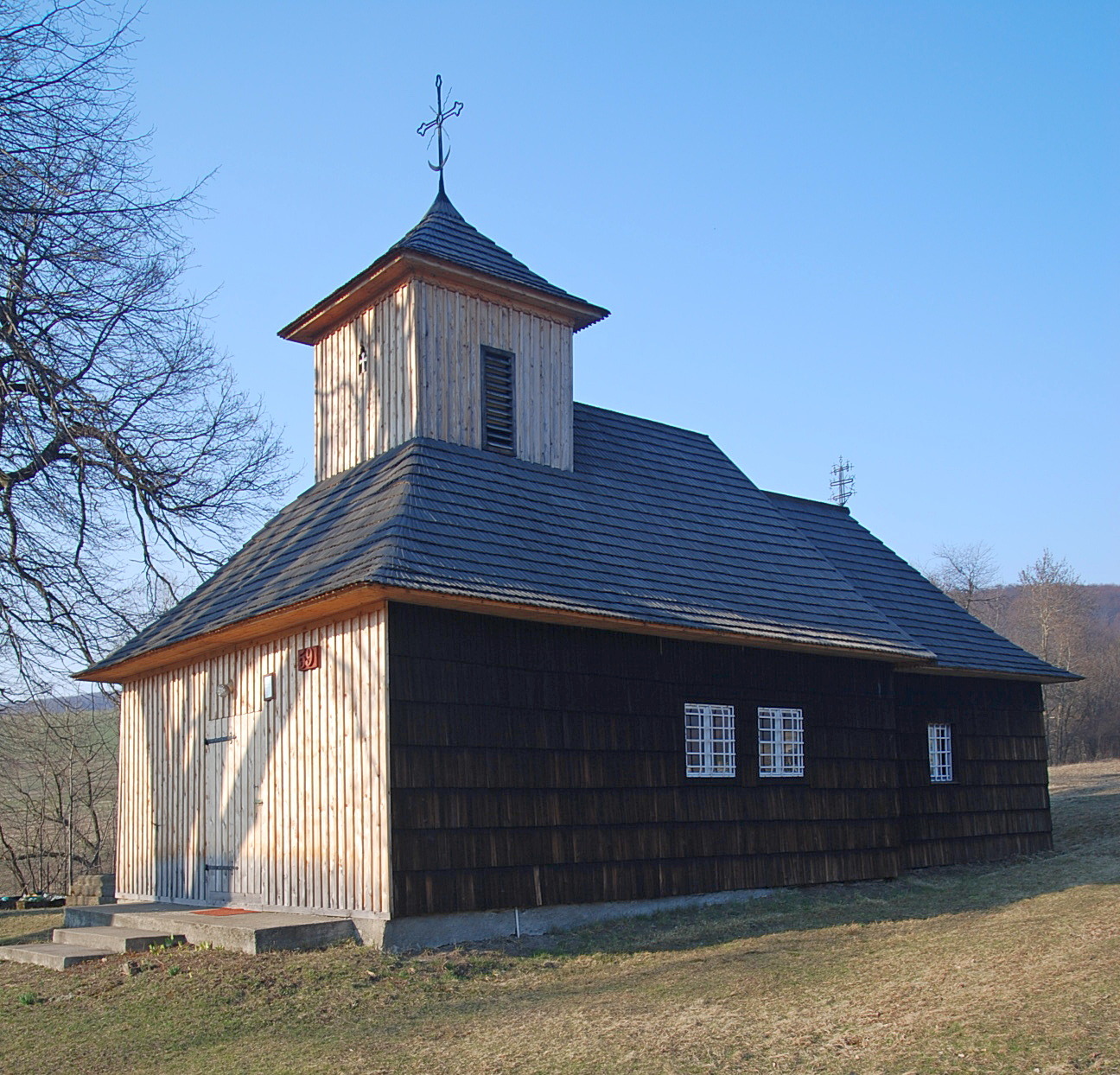 wieś Vyšná Polianka